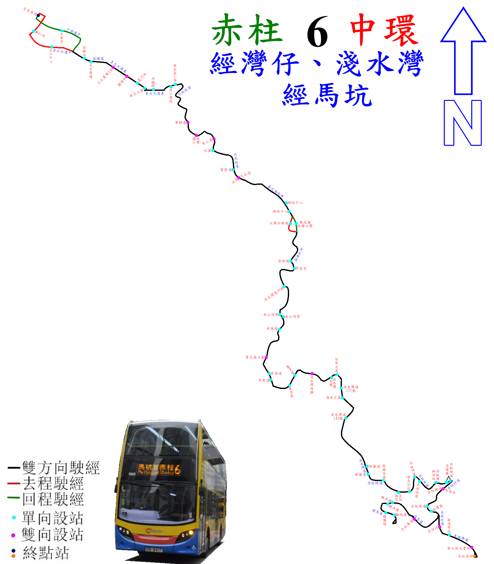 中文（香港）: 城巴6號線的走線圖